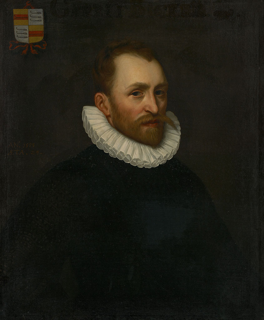 schilderij; burgemeester van Amsterdam; portret; portret Amsterdam; mansportret; Bicker, Gerrit Pietersz.